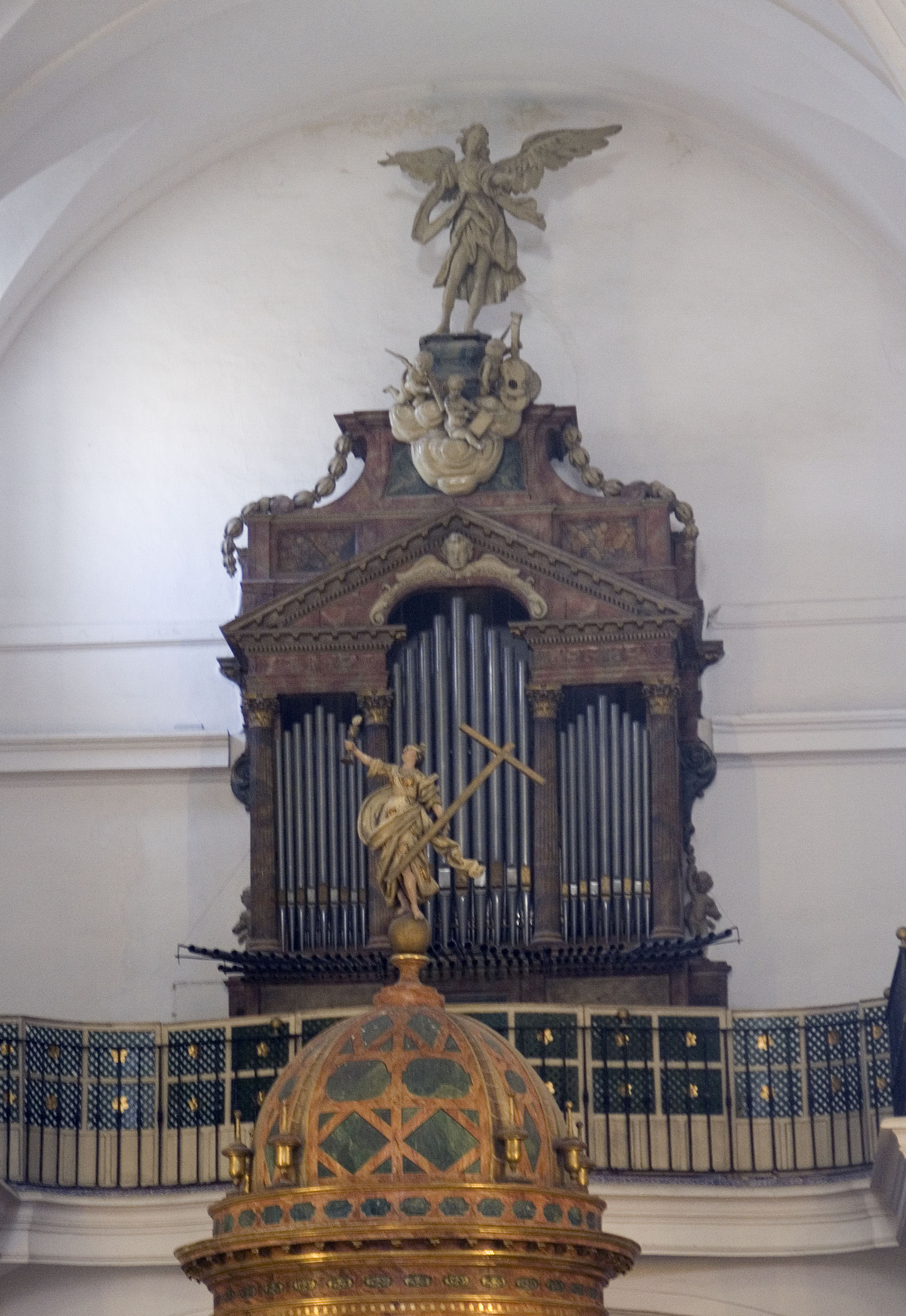 Órgano de la Iglesia de Santa Cruz de Sevilla